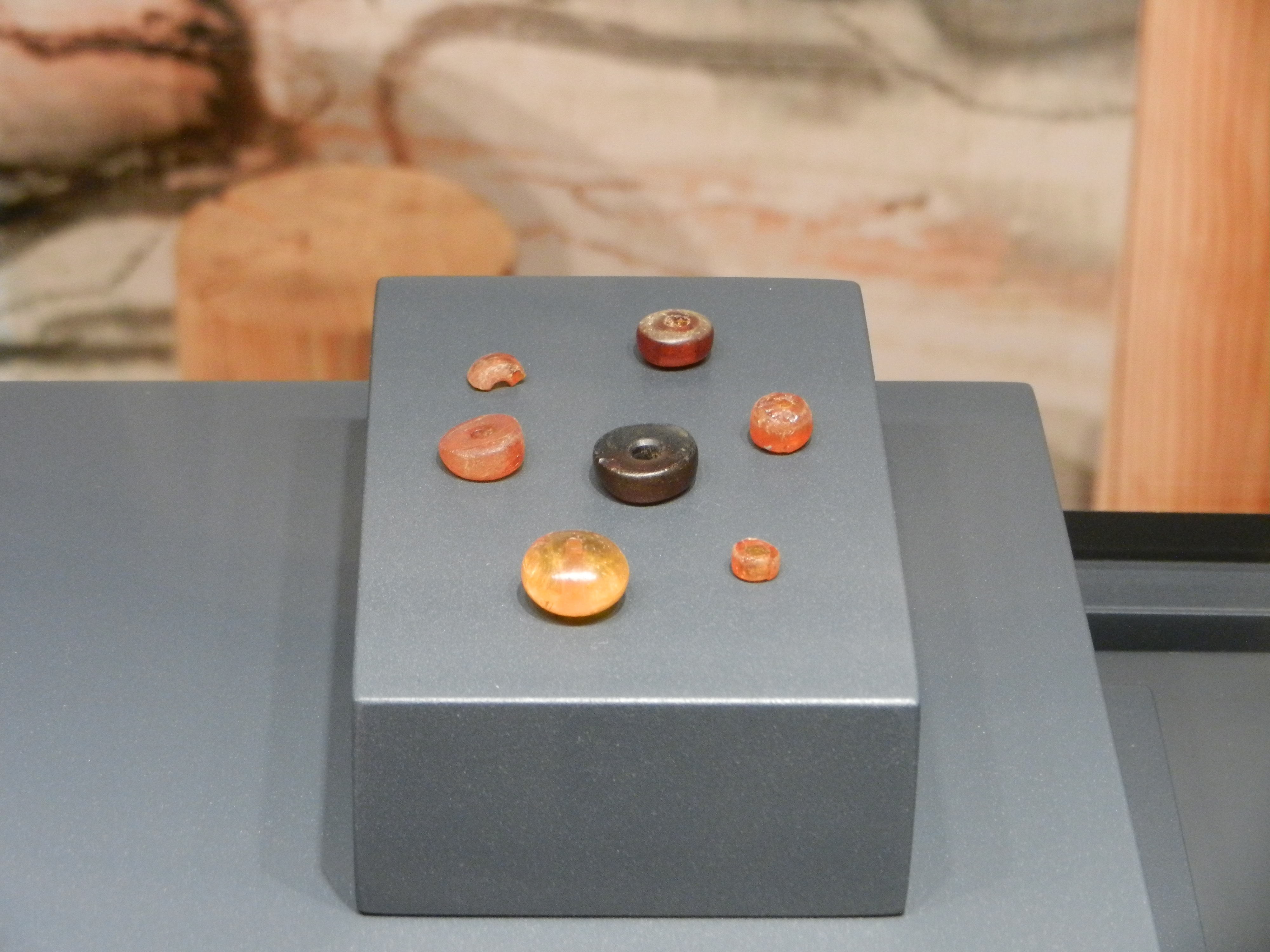 Perle di ambra di forma granulare schiacciata rinvenute nel villaggio Fiavè 6. Le analisi in spettroscopia infrarossa hanno comprovato che l'ambra è succinite baltica e quindi proveniente dal Nord Europa.